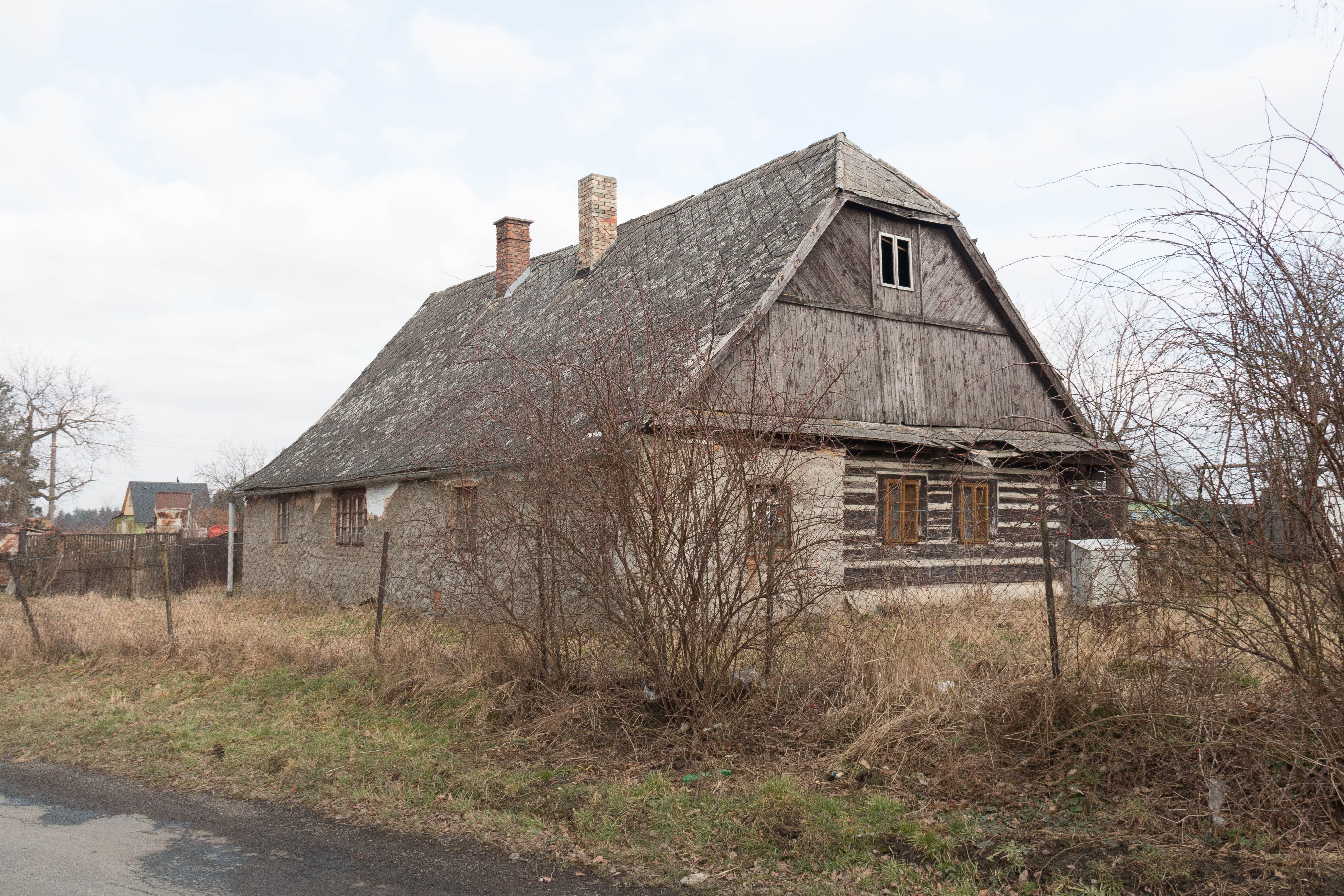 Podlíšťany čp. 3